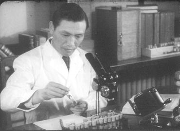 Hongfu Chu (1910-2002) Chinese entomologist